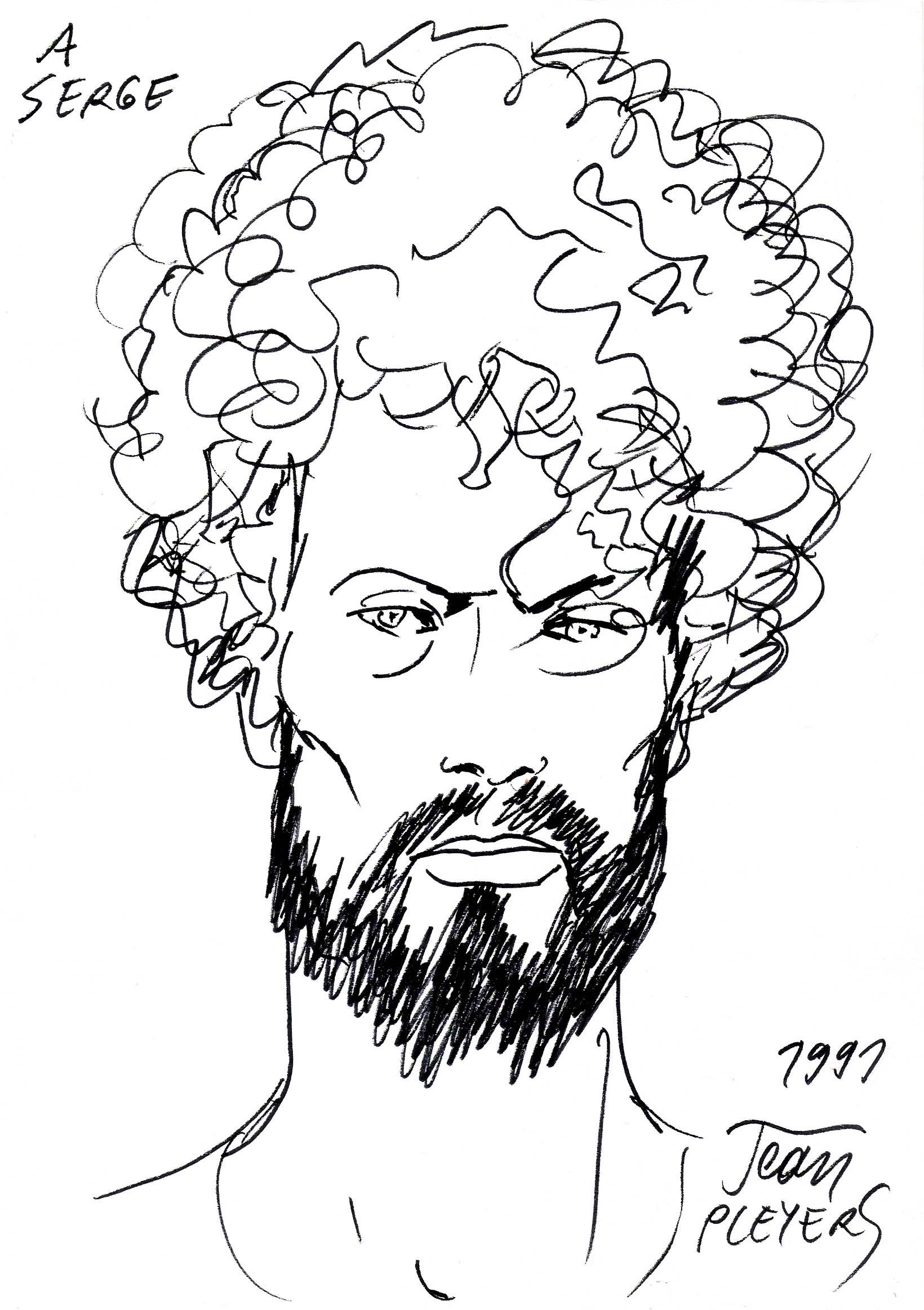 Dédicace du dessinateur Jean Pleyers, effectuée en 1991. Représentation de Gilles de Rais, personnage de la série de bandes dessinées Jhen scénarisées par Jacques Martin et dessinées par Jean Pleyers.